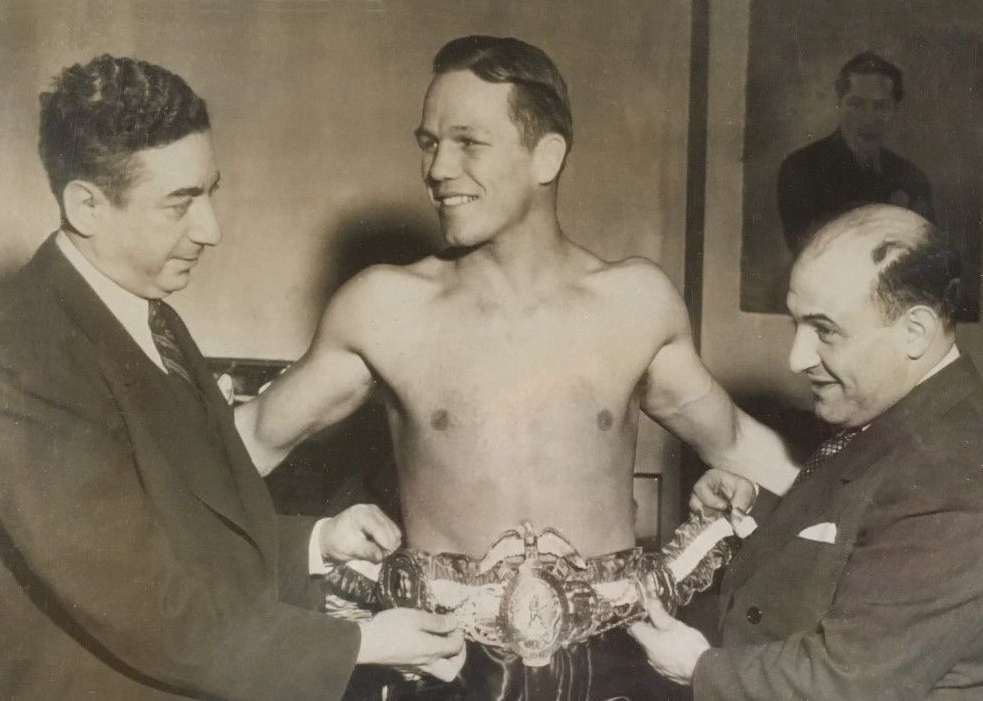 ORIGINAL 1941 TONY ZALE, MIDDLEWEIGHT BOXING CHAMPION WIRE PHOTO 8X11